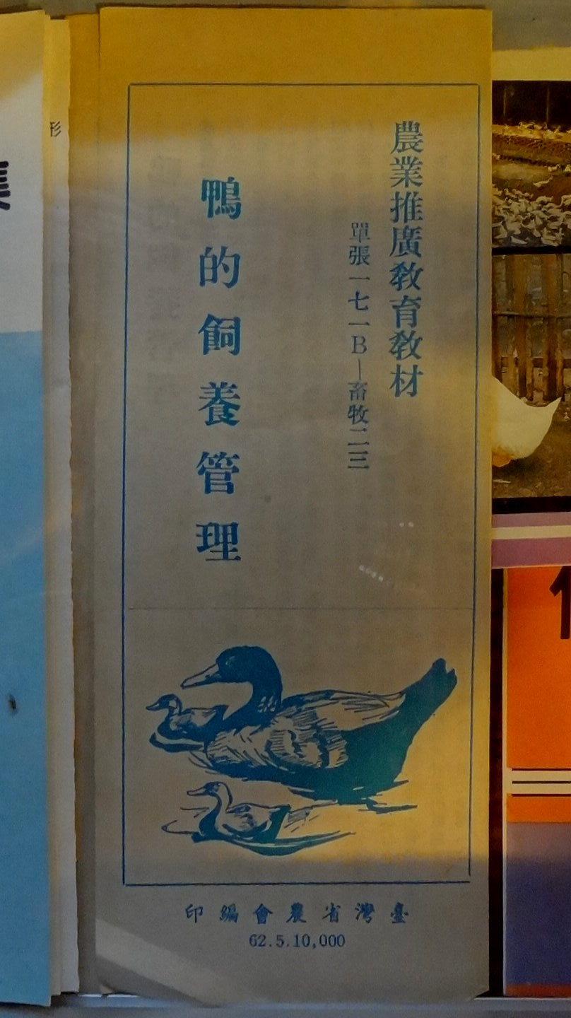 1973年5月臺灣省農會印製的農業推廣教育教材小冊子〈鴨的飼養管理〉